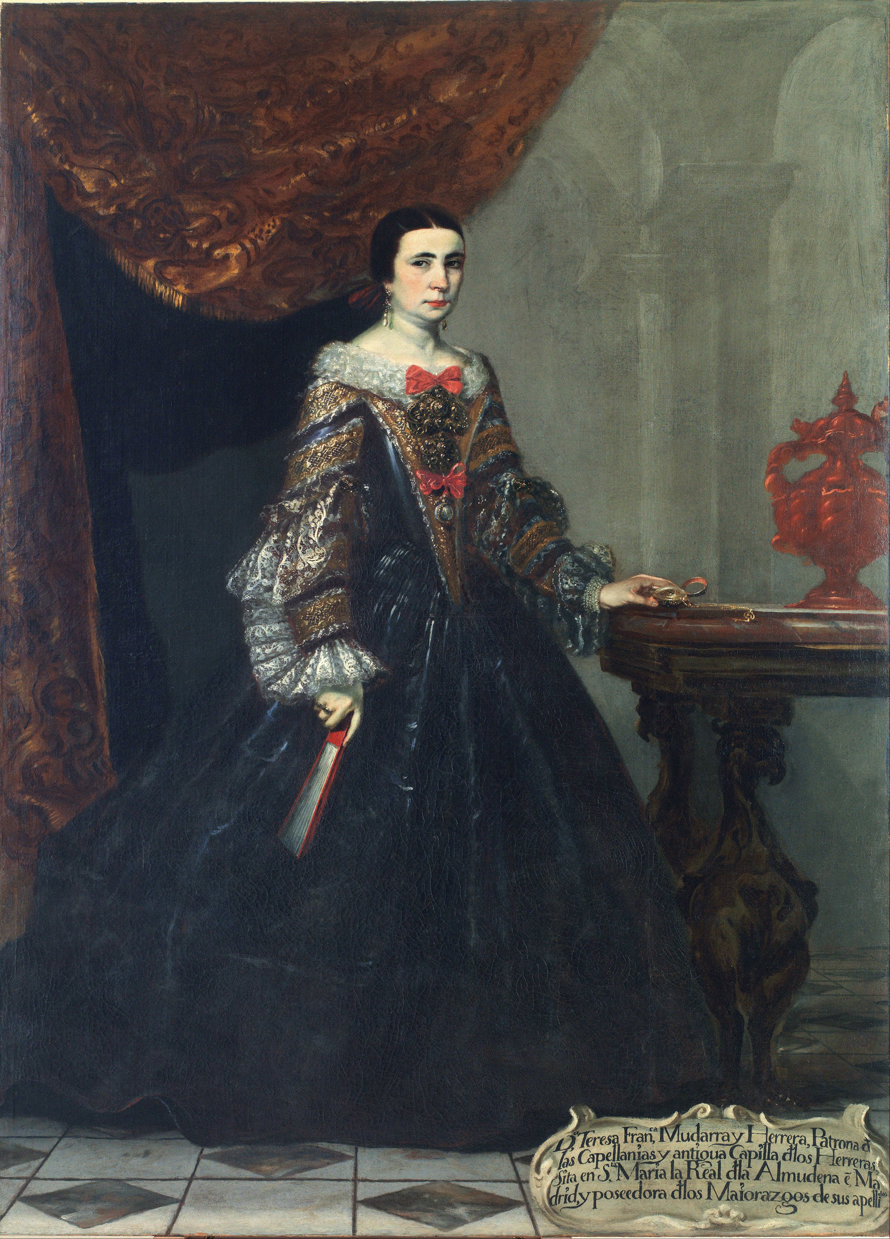 Retrato de la aristócrata española Teresa Francisca Mudarra y Herrera, que fue la esposa de Juan de Larrea y Heredia, caballero de la Orden de Calatrava, señor de la Casa y Torre de Larrea en la merindad de Zornoza, en el Señorío de Vizcaya, miembro del Consejo y Junta de Guerra y de Indias durante el reinado de Carlos II de España y también secretario de Estado y del Despacho Universal.